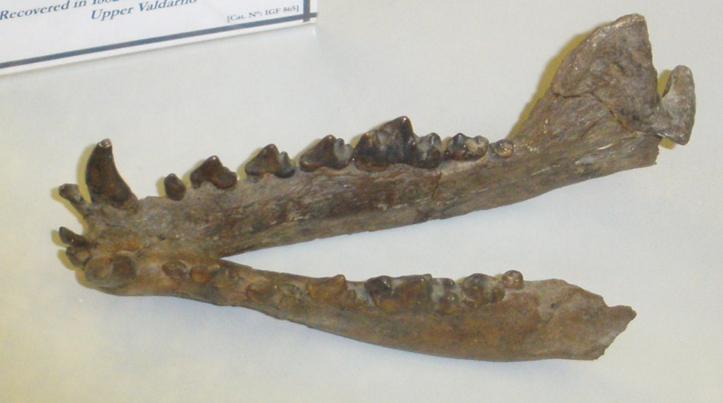 Fossil of Xenocyon, an extinct mammal -- Topok the picture at Museo di Paleontologia di Firenze